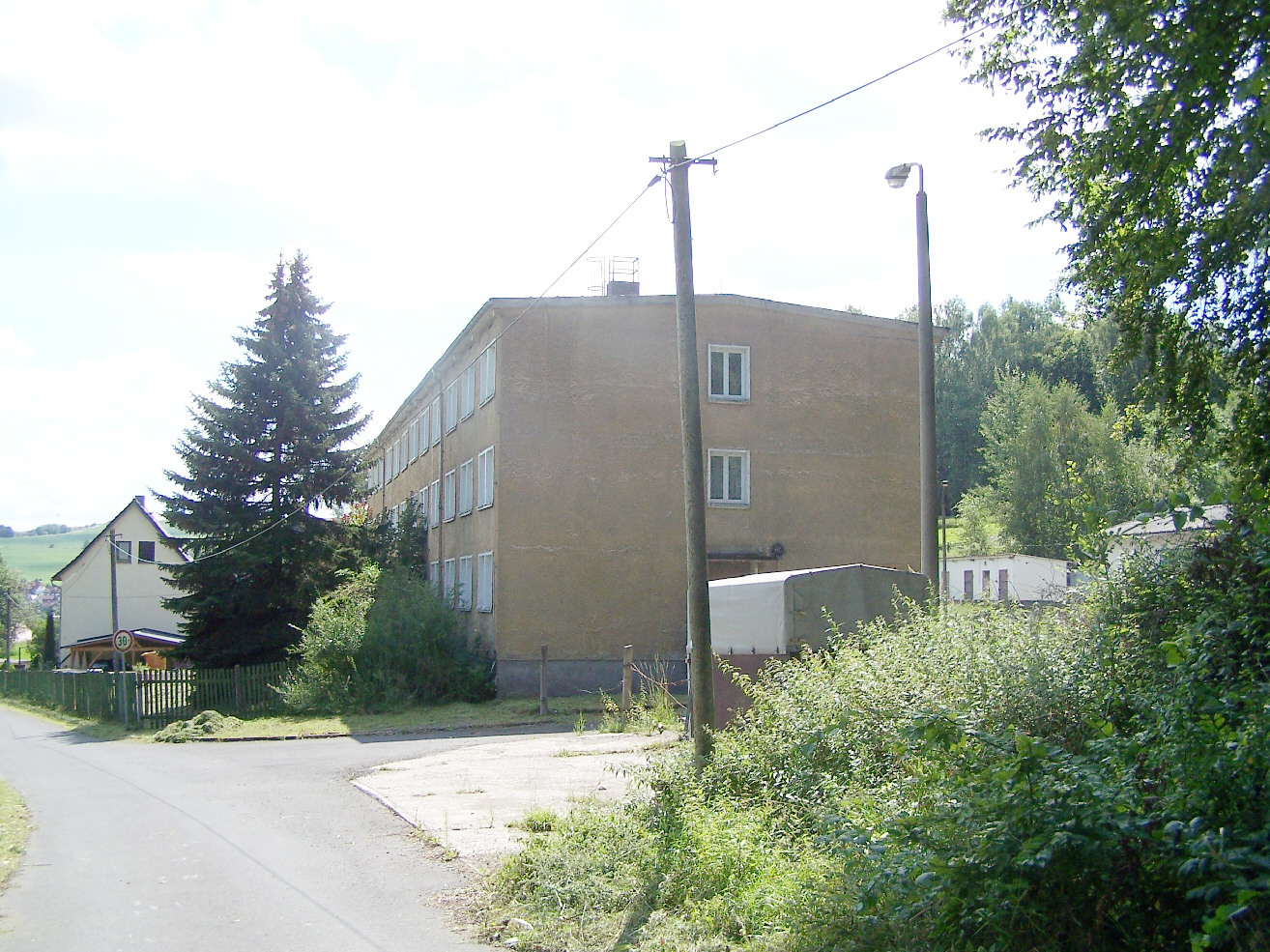 Die ehemalige "Kaserne" der Grenztruppen in Kirstingshof.